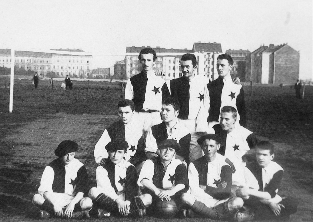 První fotbalová jedenáctka SK Slavie v roce 1896 v tradičním dresu a v baretech, jak velel klubový mrav. V horní řadě uprostřed brankář Vosátka, tehdy neměl odlišný dres od hráčů v poli.